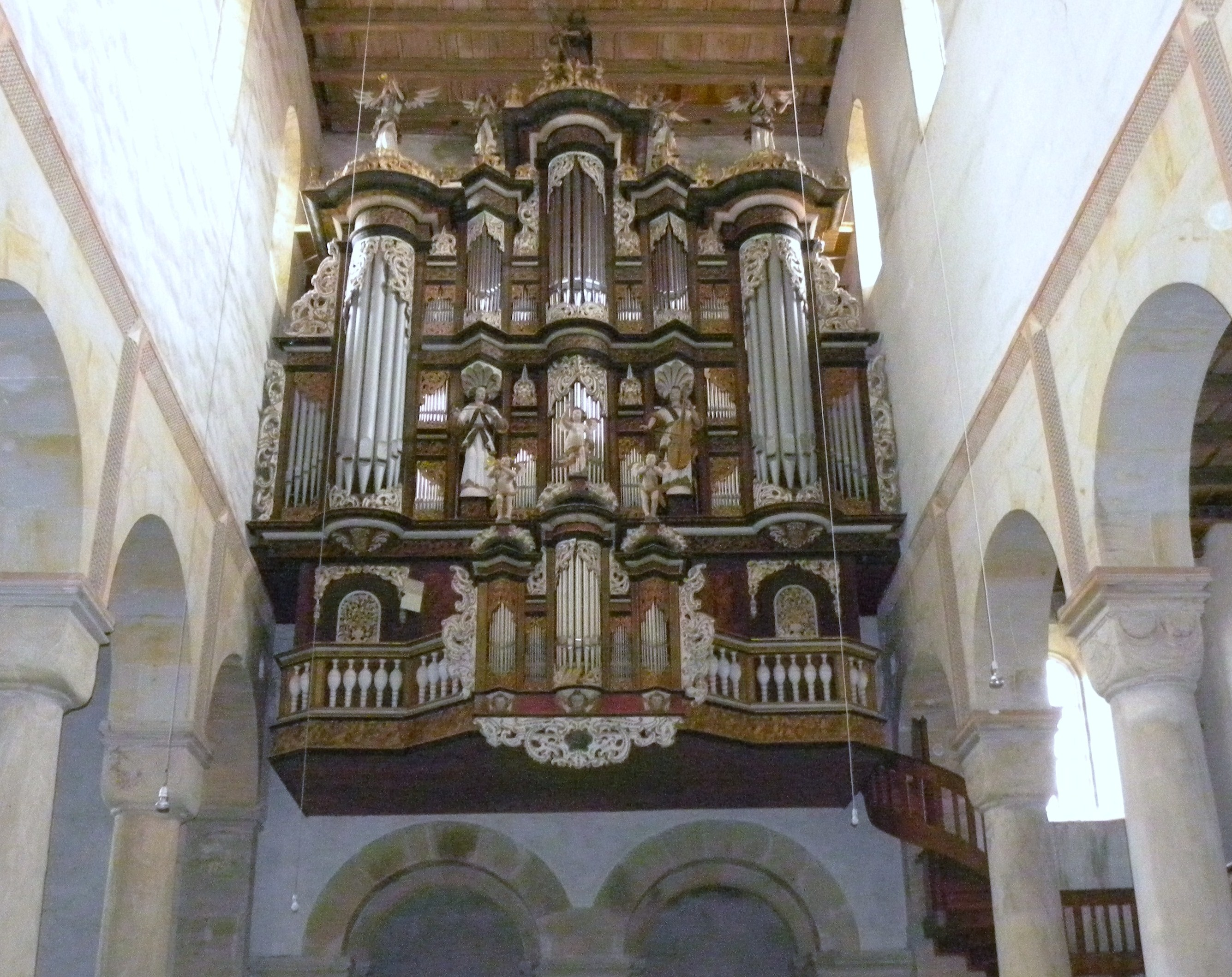 Restaurierte Orgel in der Stiftskirche St. Pankratius in Hamersleben